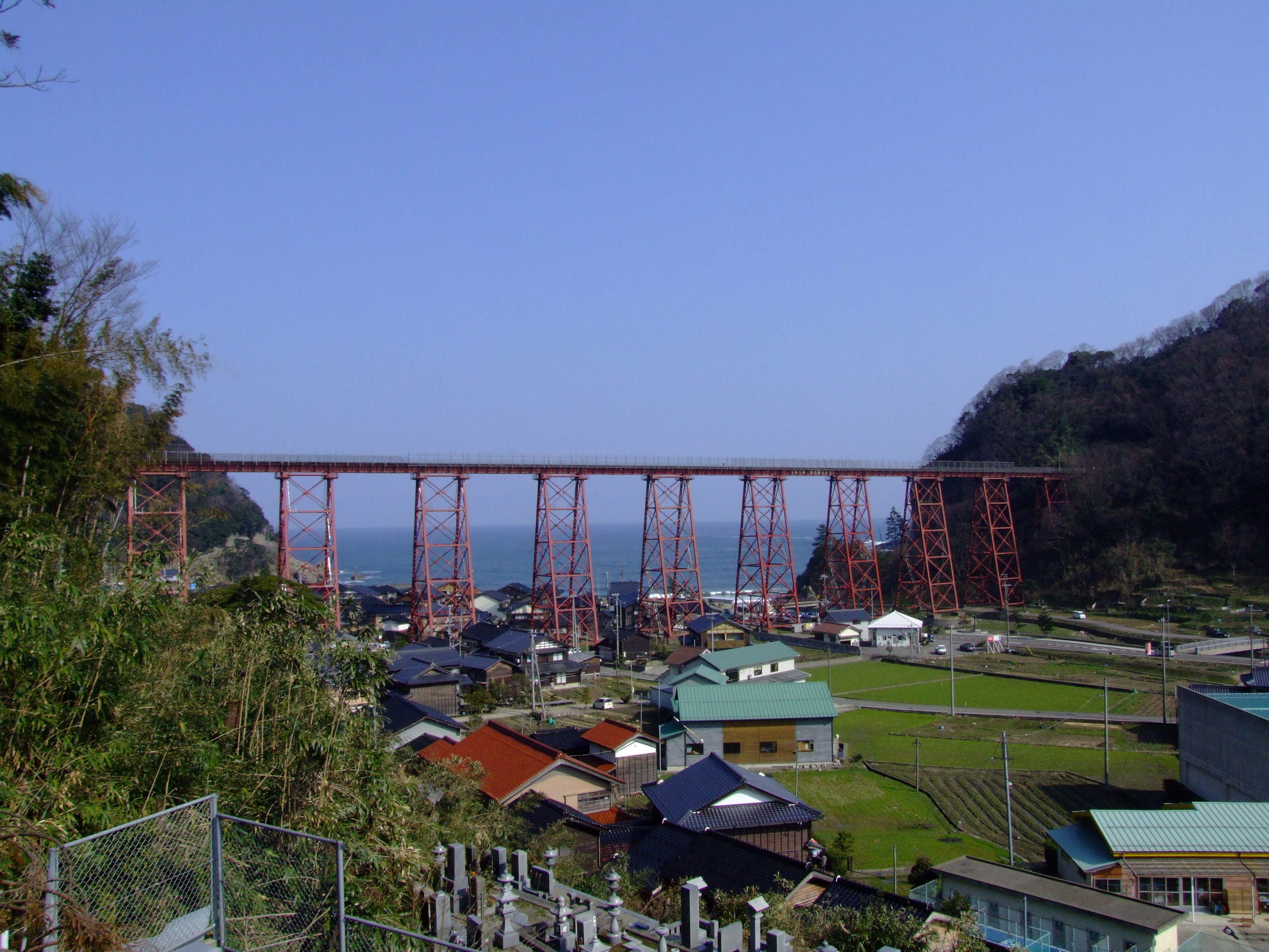 （ほぼ）全景。 左の竹やぶの後ろに隠れている1基を含め、11基の橋脚を持つ。